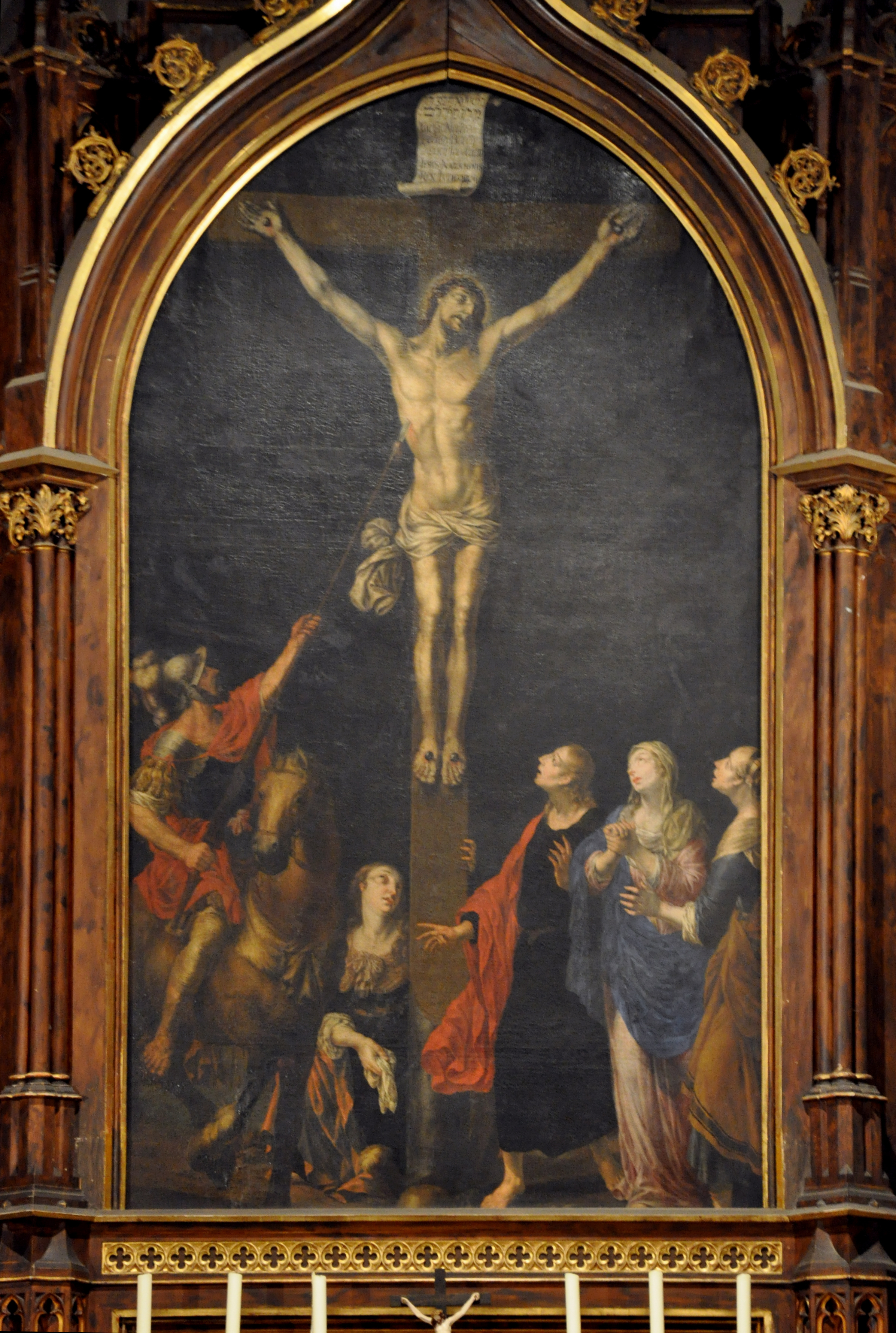 Memmingen, Kirche Unser Frauen, Altarblatt "Kreuzigung"